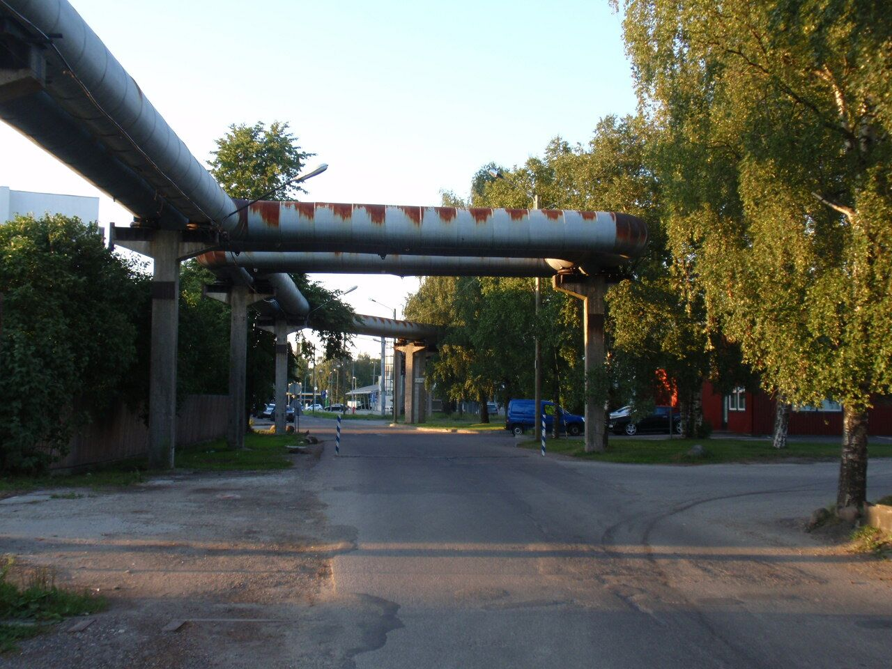 Pirni tänav Tallinnas.